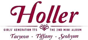 Logo del EP de Girls' Generation-TTS «Holler»